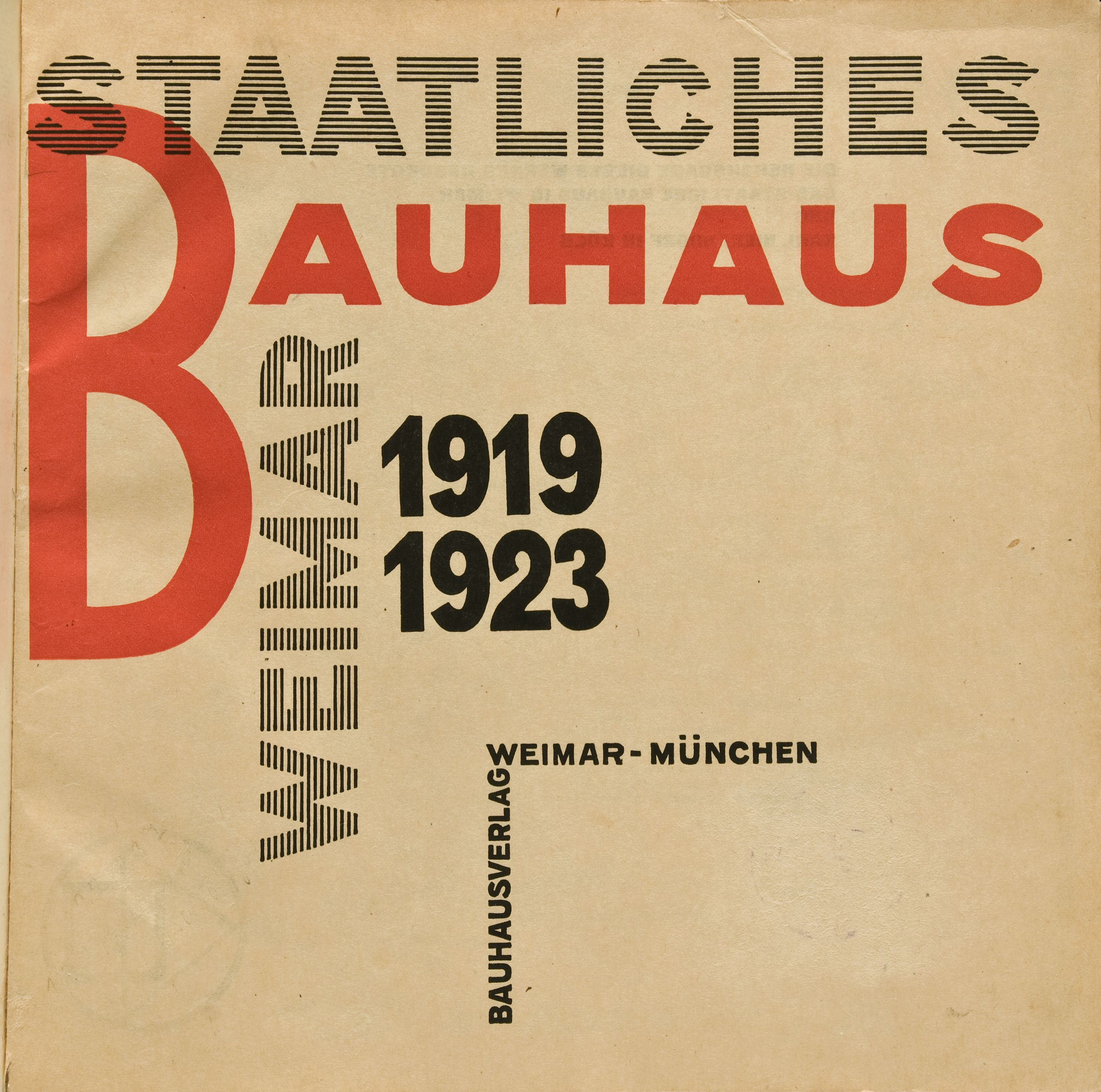 Staatliches Bauhaus in Weimar 1919-1923 (1923), Titelseite (Entwurf von László Moholy-Nagy), Foto: Tobias Adam